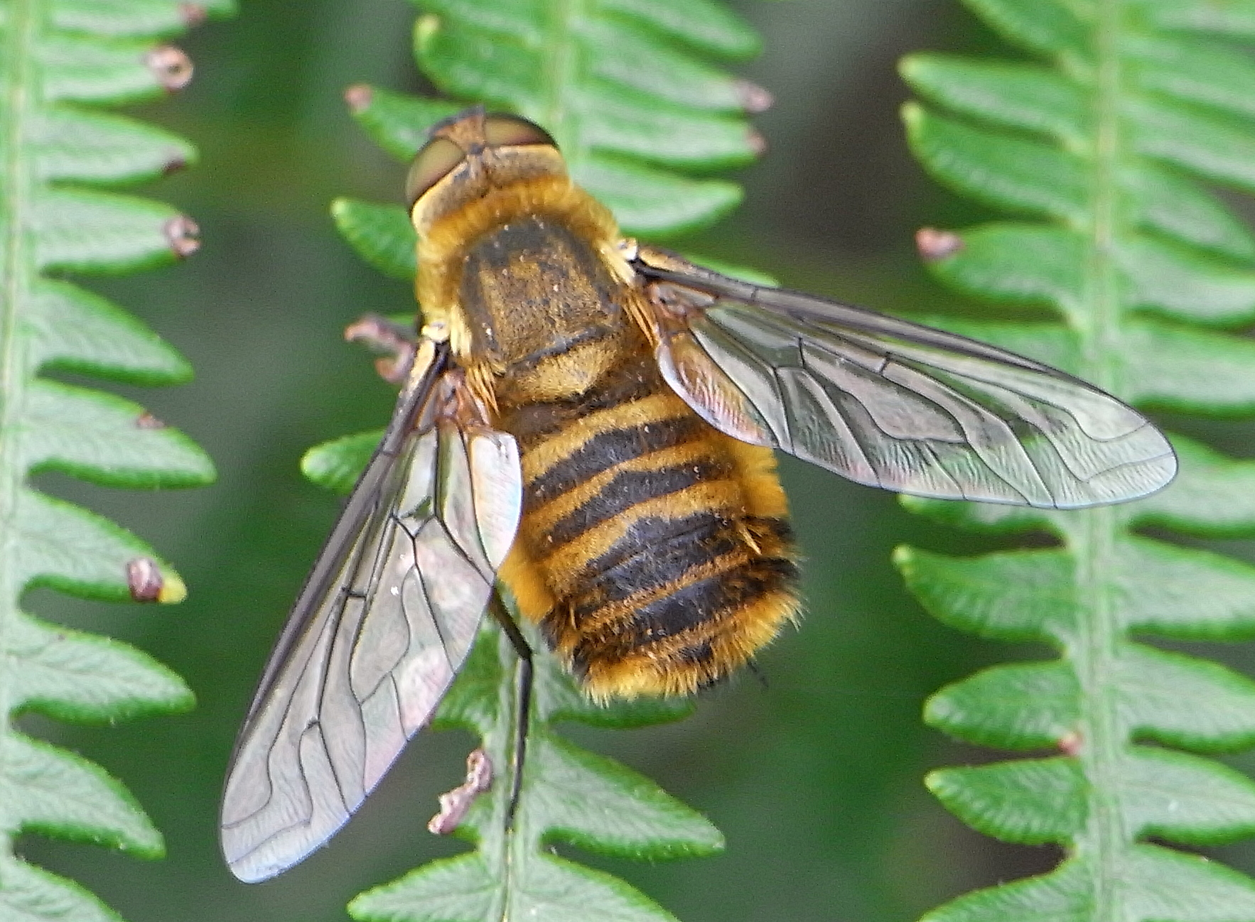 Female of Villa hottentotta from Lasalle (France) Ricoh R8